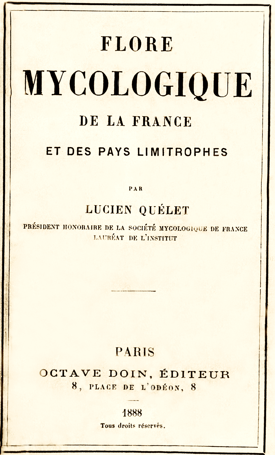 Lucien Quélet:Flore mycologique de la France et des pays limitrophes 1888, Deckblatt